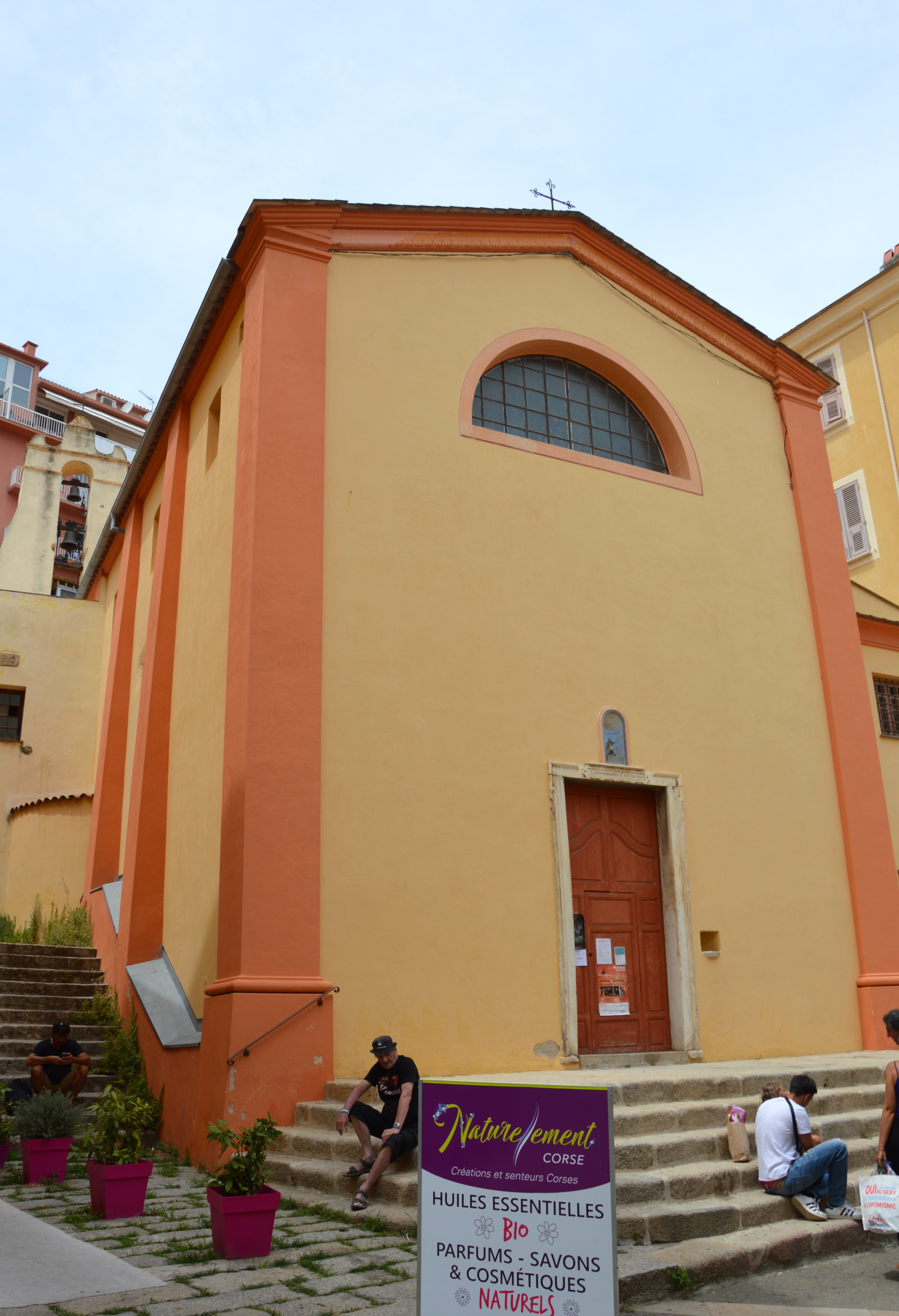 Kapelle Saint-Roch d'Ajaccio